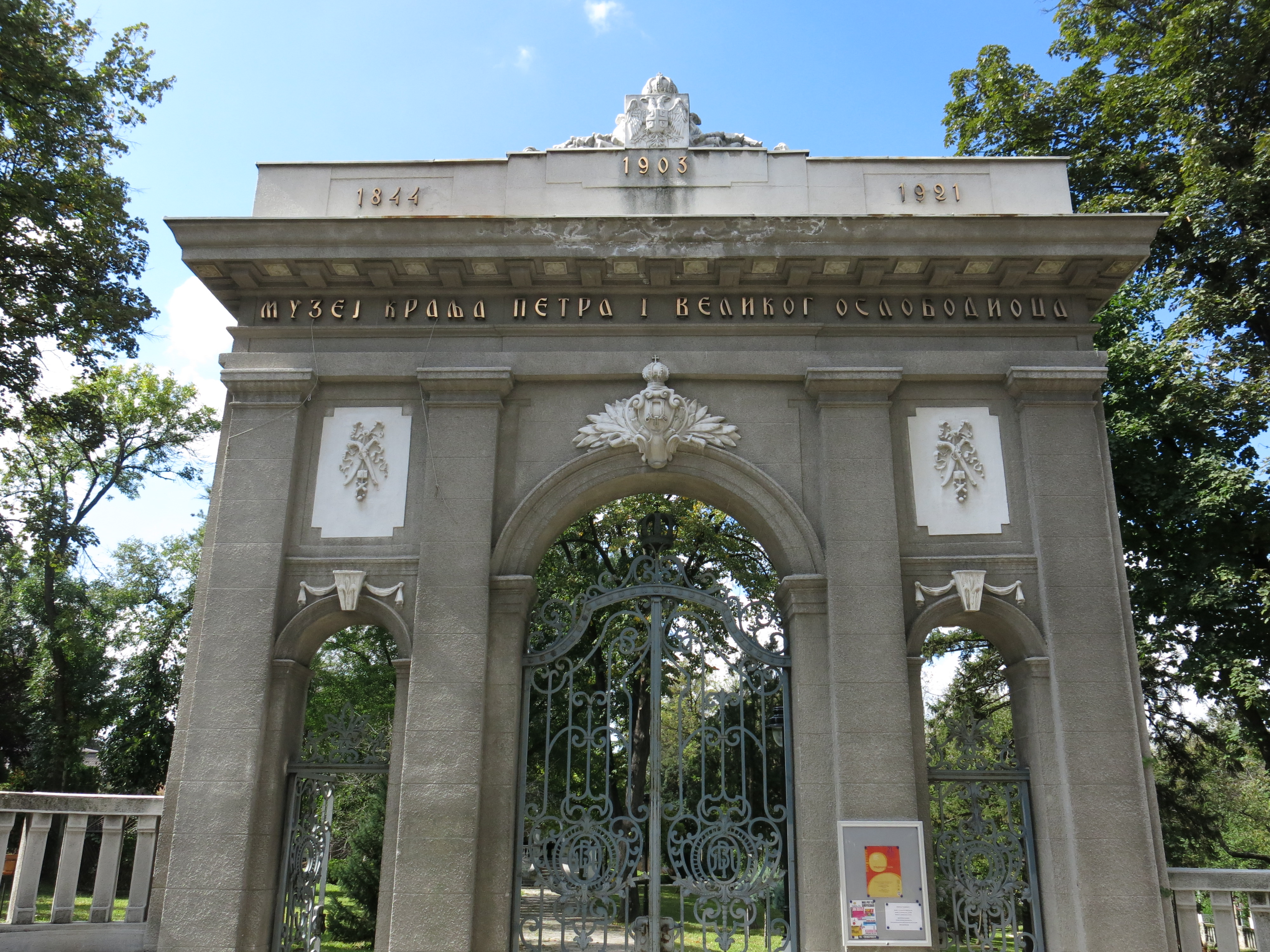 Кућа краља Петра I Карађорђевића